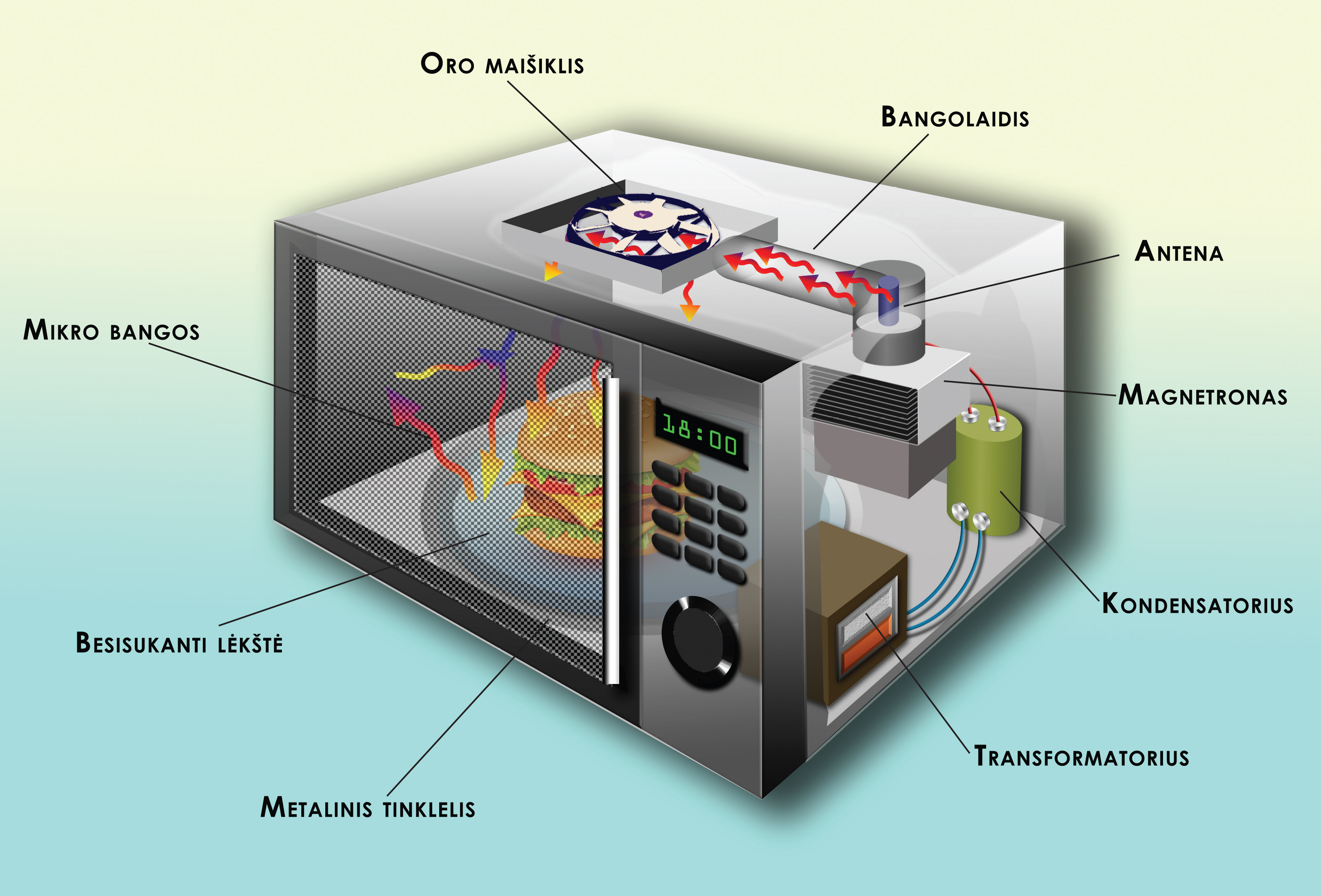 Mikrobangų krosnelės sudedamosios dalys ir veikimo principas